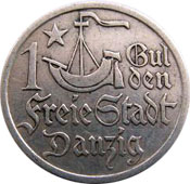 1 Gulden (Freie Stadt Danzig 1923) Aversum